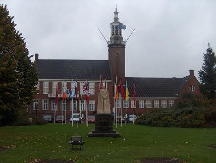 City Hall and Memorial Resistance Second World War (1949)